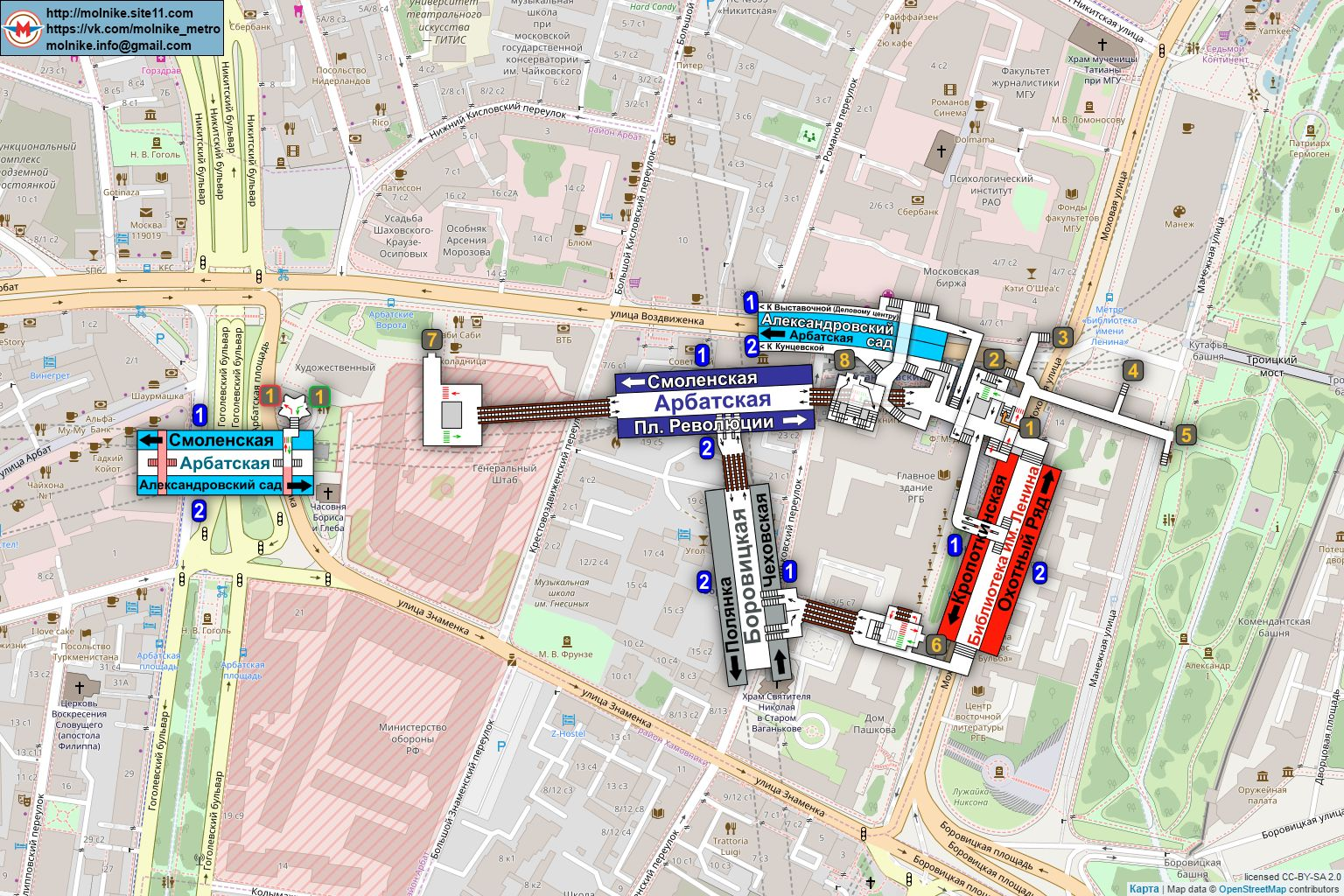 Схема станций метро «Боровицкая», «Библиотека имени Ленина», «Александровский сад» и «Арбатская» (Арбатско-Покровской и Филёвской линий) на карте Москвы